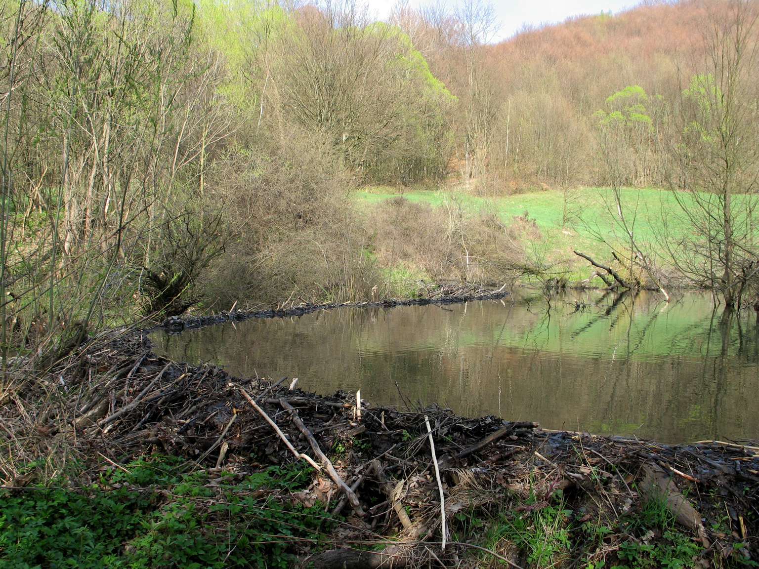 Bobria umelá vodná nádrž na rieke Bodružalík, 200 m nad obytnými domami